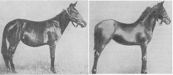 Эксперимент, который опроверг телегонию. Слева - гибрид зебры и лошади после скрещивания кобылы с жеребцом зебры. Справа - кобылица после скрещивания той же кобылы, но уже с жеребцом лошади. Эксперимент был проведен правительством США и опубликован в "Genetics in Relation to Agriculture" Е. Б. Бэбкоком и Р. Клаузеном.